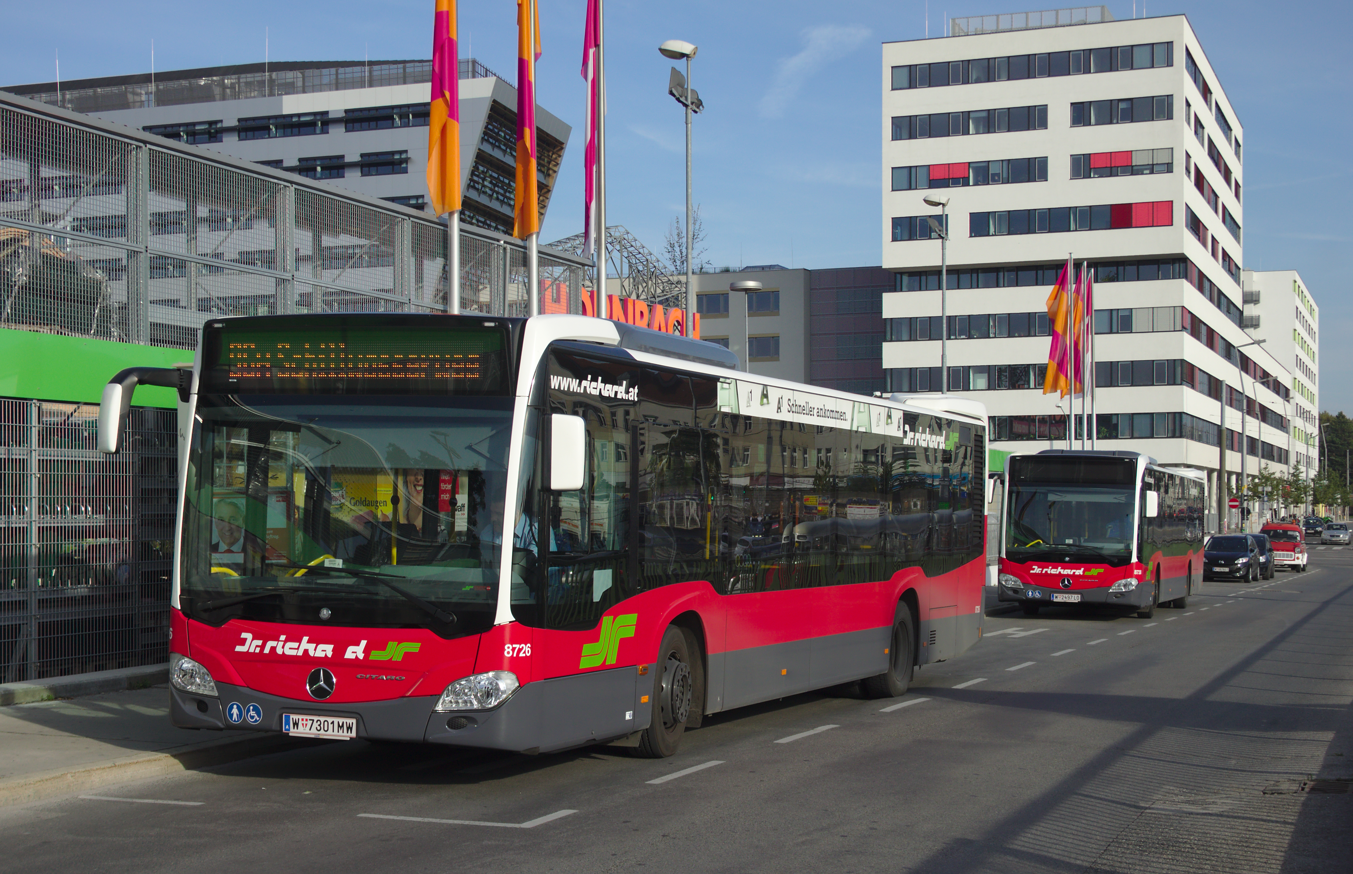 Zwei "Mercedes-Benz Citaro"-Busse des Unternehmens Dr. Richard halten bei der Haltestelle Erzherzog-Karl-Straße S vor der dortigen Hornbach-Filiale Pause: vorne 8726 (Kennzeichen W 7301 MW) beschildert als 96A Richtung Schillwasserweg, hinten 8738 (Kennzeichen W 2497 LO).